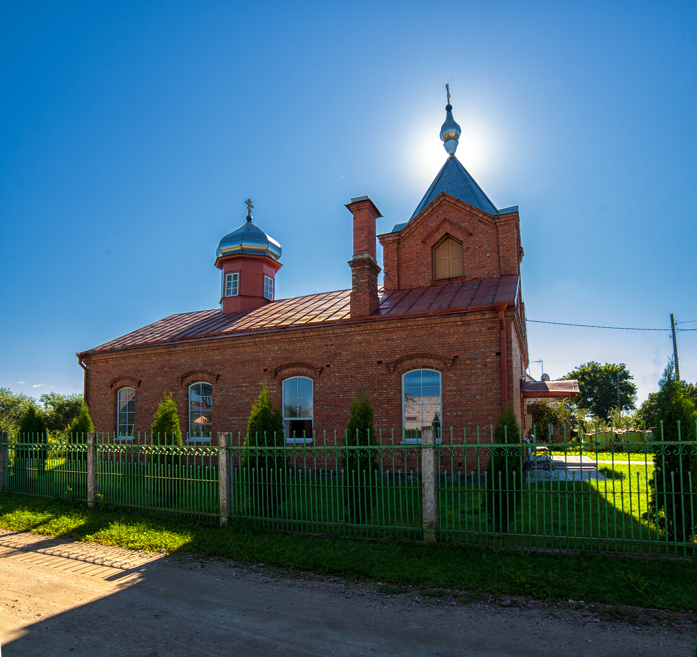 Nīderkūnu vecticībnieku lūgšanas nams